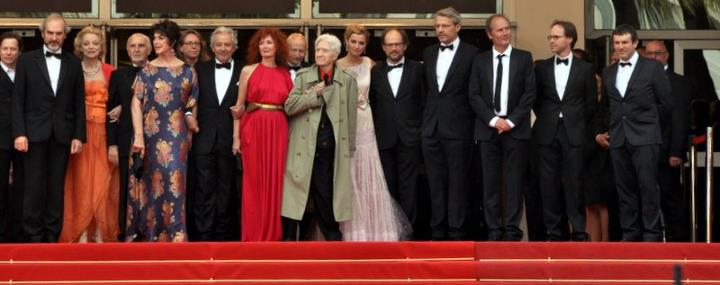 L'équipe de Vous n'avez encore rien vu au festival de Cannes. De gauche à droite : Mathieu Amalric, Michel Vuillermoz, Caroline Silhol, Jean-Louis Livi, Annie Duperey, Julie Salvador (second plan), Pierre Arditi, Sabine Azéma, Gilles Jacob (second plan), Alain Resnais, Anne Consigny, Denis Podalydès, Lambert Wilson, Hippolyte Girardot, ?, Christophe Jeauffroy